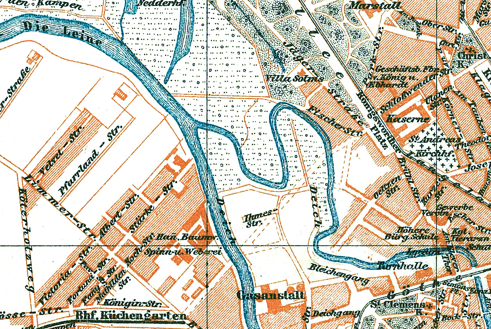 Ausschnitt aus einem hannoverschen Stadtplan aus dem Jahr 1888 aus Meyers Konversations-Lexikon, 4. Auflage Band 8, Seite 138a+138b. Der Ausschnitt zeigt den projektierten Verlauf der späteren Königsworther Straße vom Königsworther Platz aus (rechts oben) diagonal bis zum Bahnhof Küchengarten in Linden. Die später anfangs Ihmestraße genannte Verkehrsverbindung quert hier mittels der erst noch zu bauende Glockseebrücke (später: Spinnereibrücke, ab 1963 Leinertbrücke) die Ihme ...